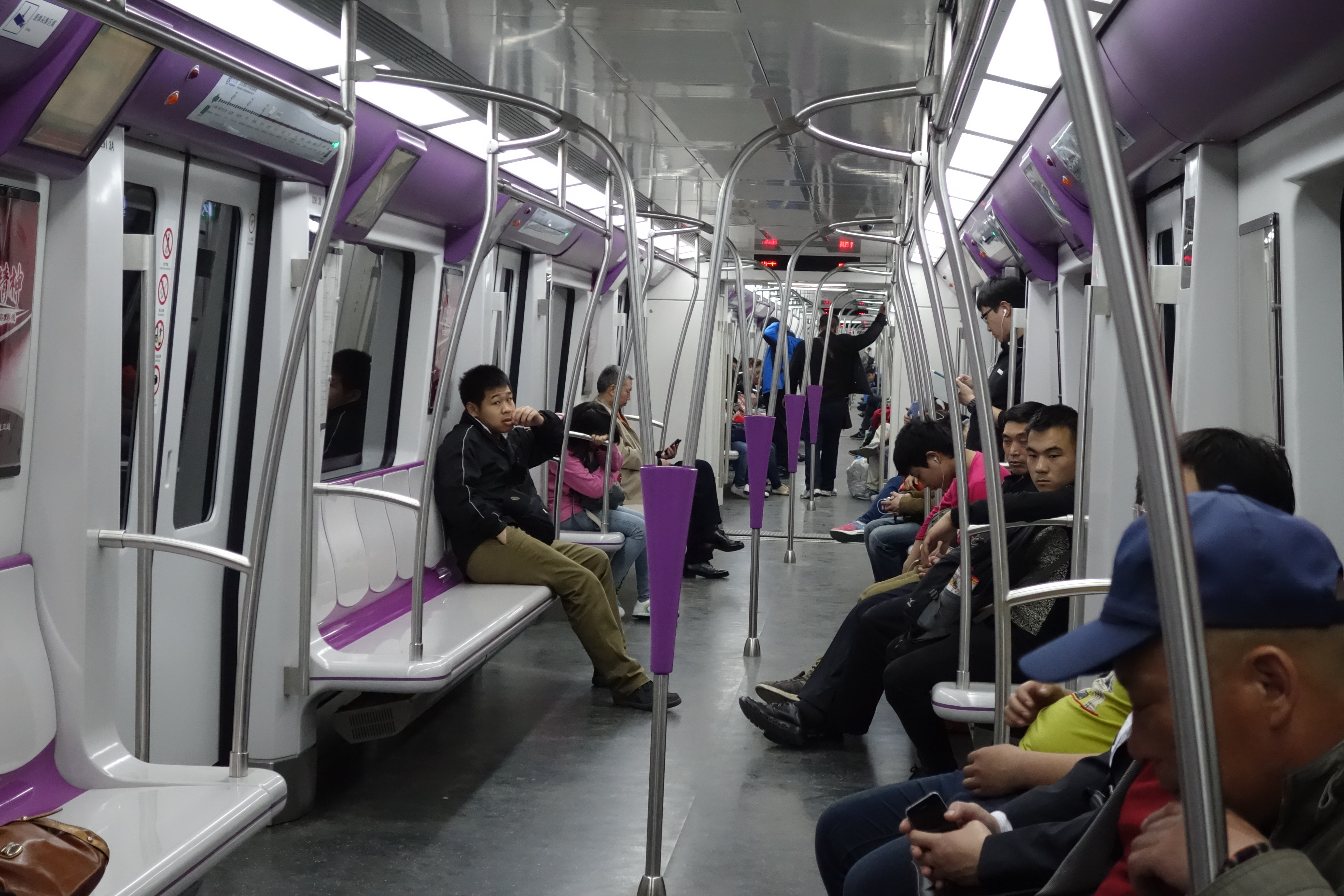 北京地铁15号线列车车厢内